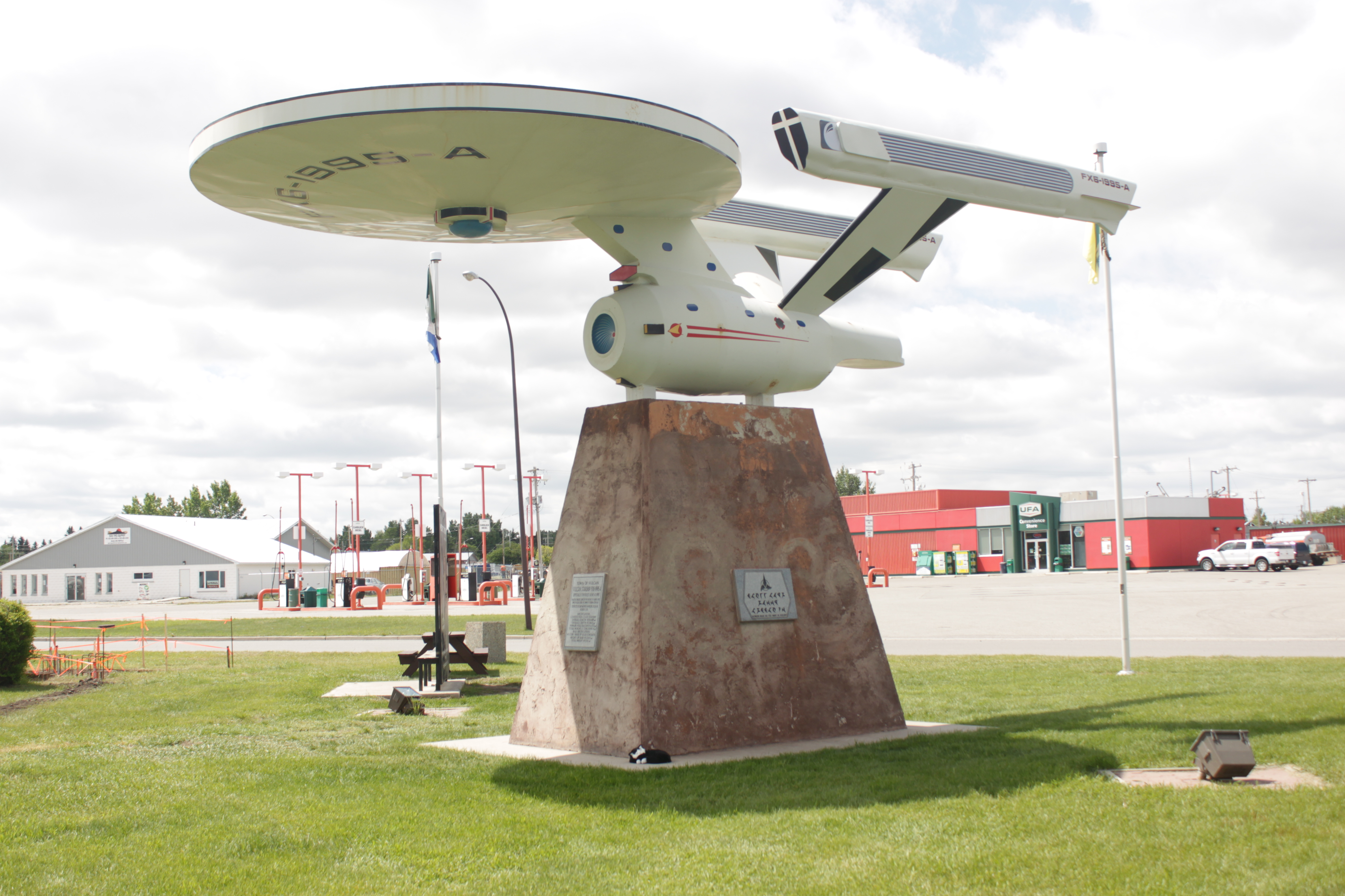 after upload